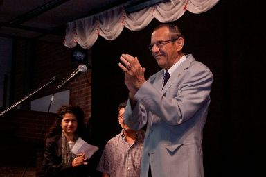 Homenatge a Pere Serrat a l'Escola Bon Pastor